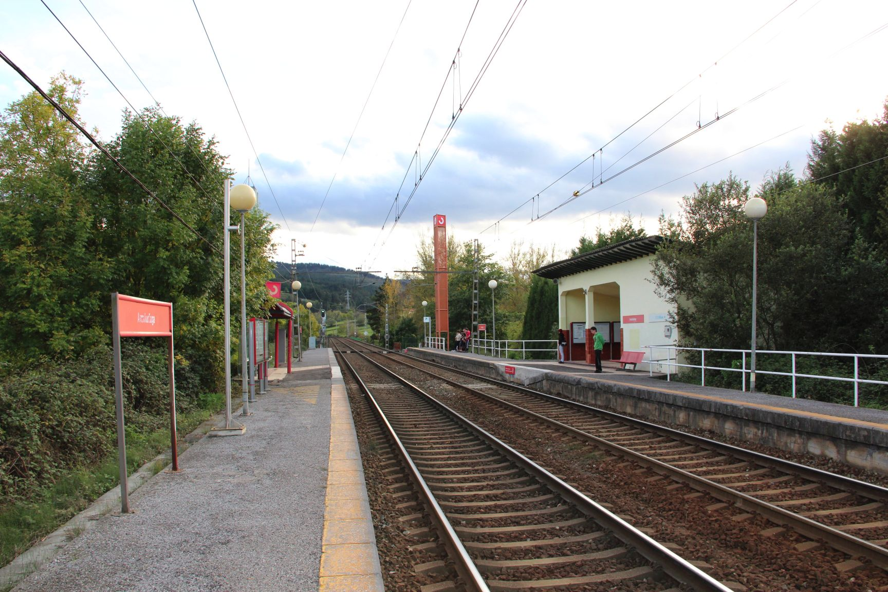 2012_Arrankudiaga_Artxiboa (II)_011